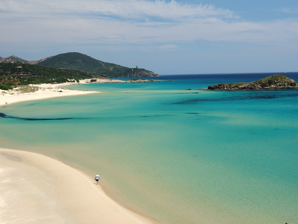 Su Giudeu, Chia, Sardinia, Italy